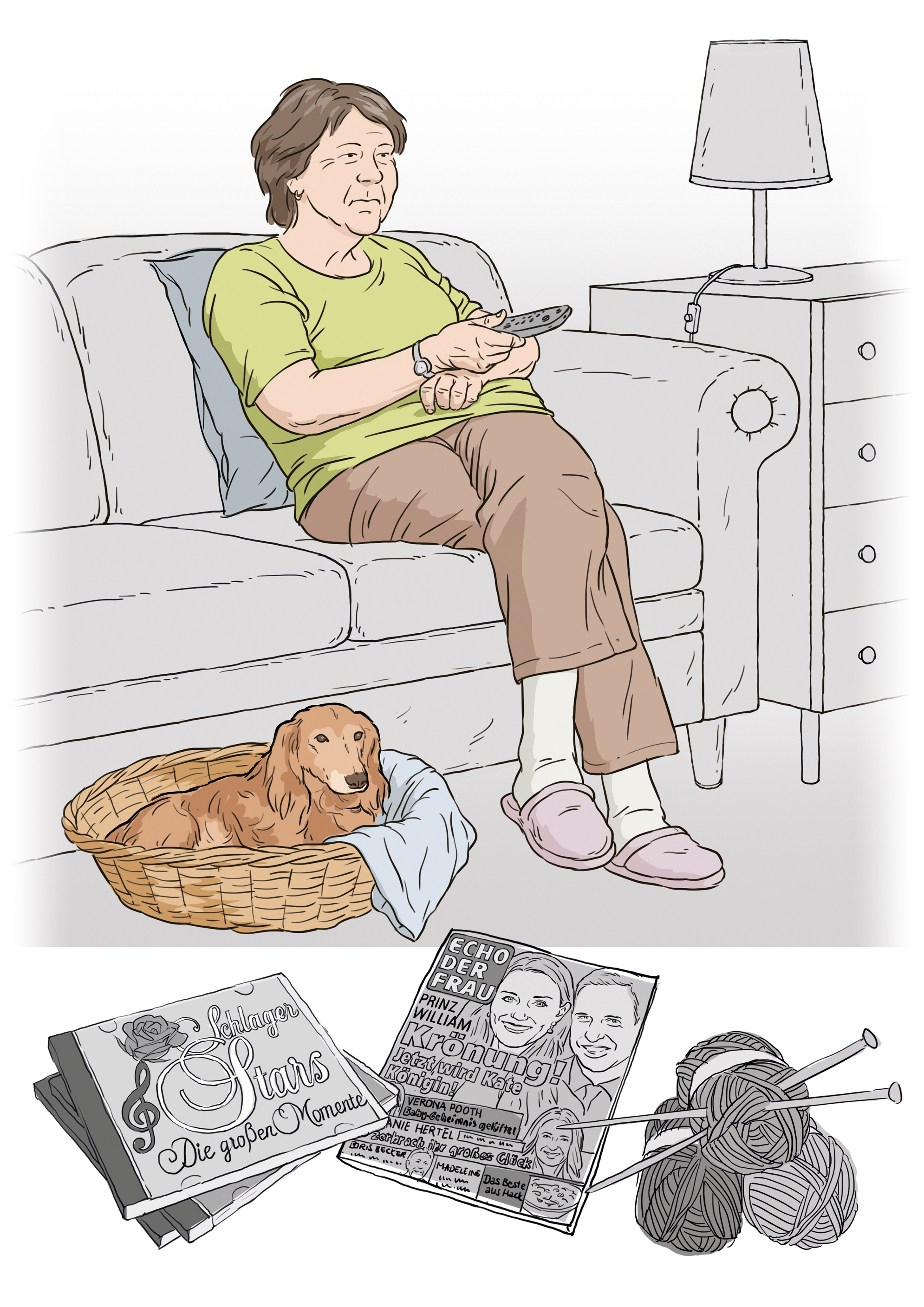 Grafische Darstellung des Typus "Zurückgezogene" aus der ARD-/ZDF-MedienNutzerTypologie. Beispielhafte Aussage: "Ich bin am liebsten daheim."